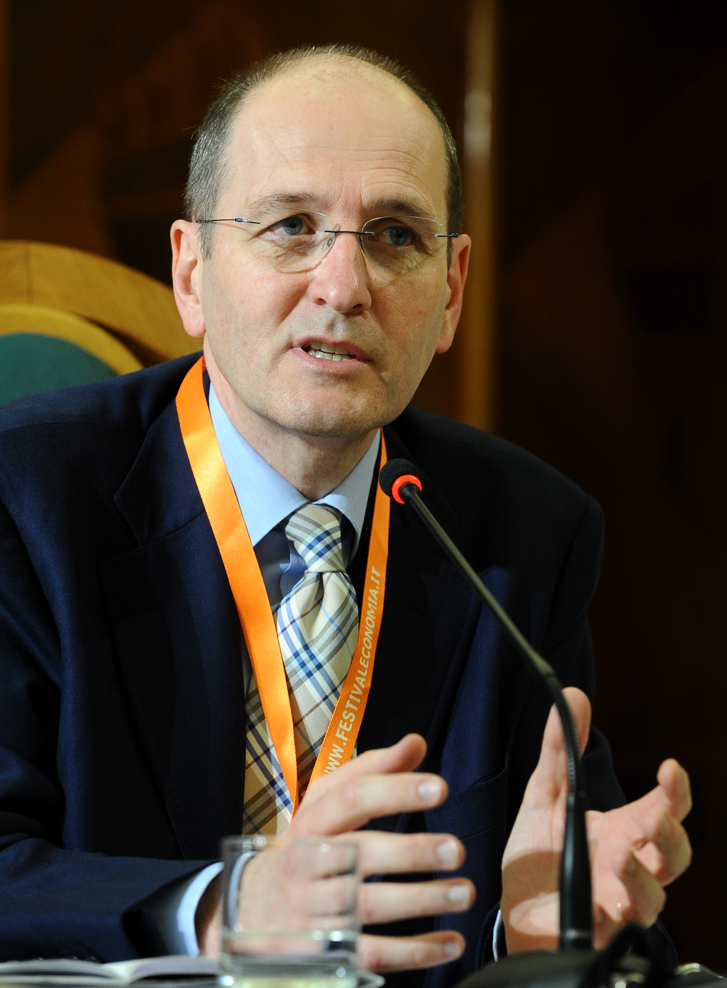 Nando Pagnoncelli al Festival dell'Economia di Trento.